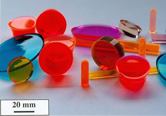 Echantillons de xérogels monolithiques de formes diverses dopés avec des molécules de colorants (Echantillons F. Chaput, CNRS-Ecole Polytechnique). Auteur : Frédéric Chaput. Licence GFDL Frédéric Chaput